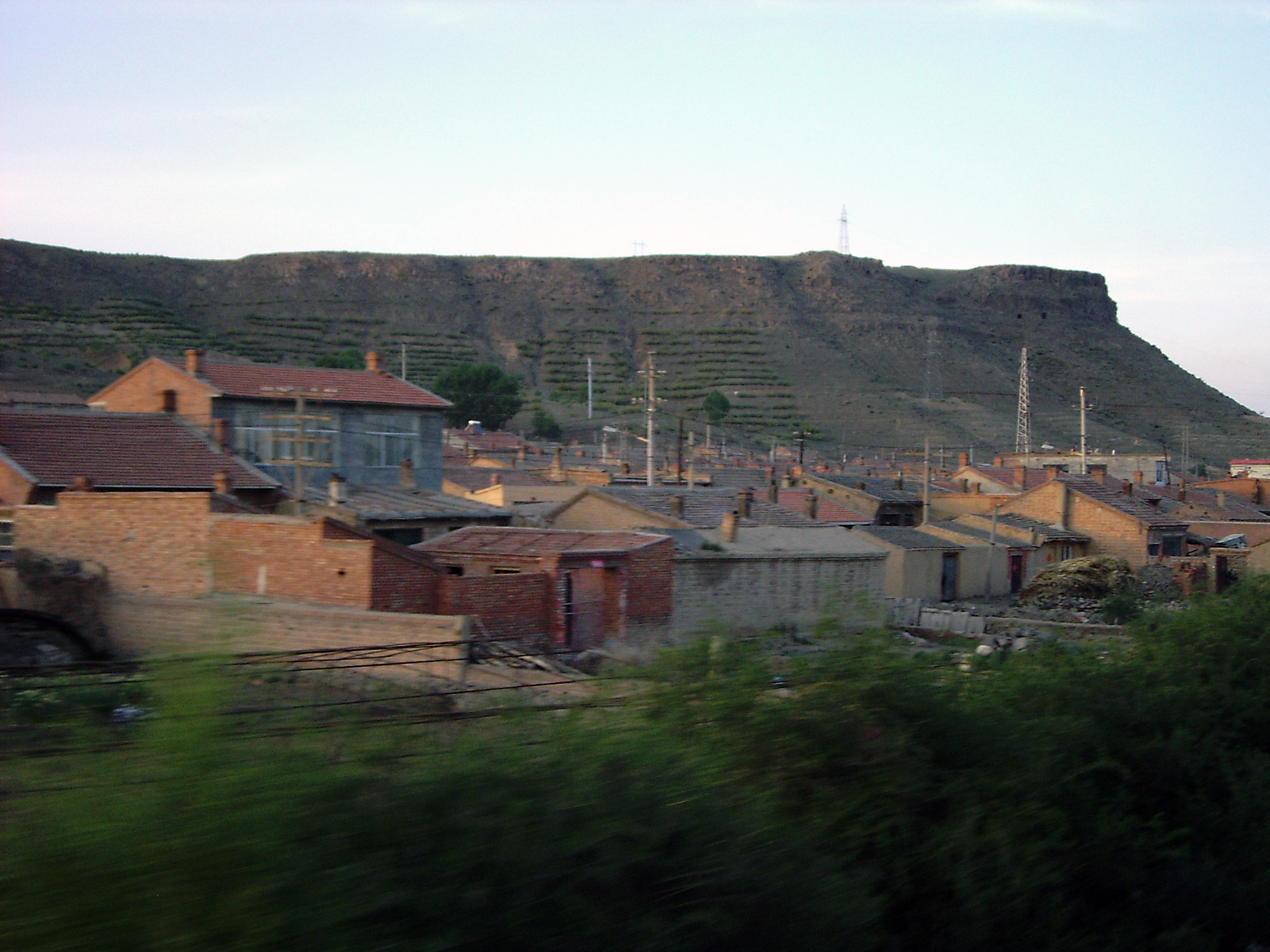 卓资山